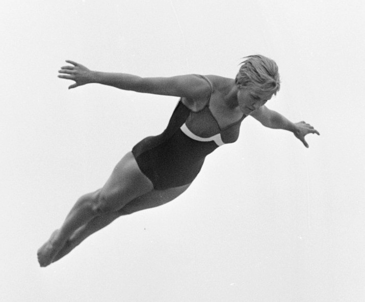 Eljo Kuiler